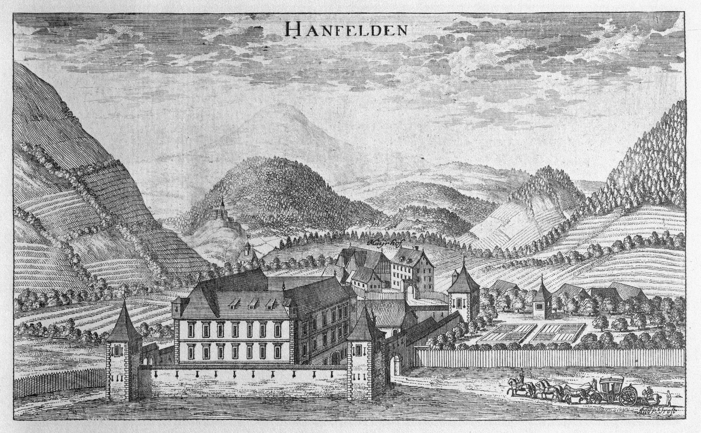 G. M. Vischers Käyserlichen Geographi, Topographia Ducatus Stiriae, Das ist: Eigentliche Delineation / und Abbildung aller Städte / Schlösser / Marcktfleck / Lustgärten / Probsteyen / Stiffter / Clöster und Kirchen / so es sich im Herzogthumb Steyrmarck befinden; Und anjetzo Umb einen billichen Preyß zu finden seynd Bey Johann Bitsch Universitäts Buchhandlern / Auff dem Juden=Platz bey der guldenen Saulen. Graz 1681 Die Nummerierung der Dateien folgt der alphabetischen Reihung der Ortsnamen